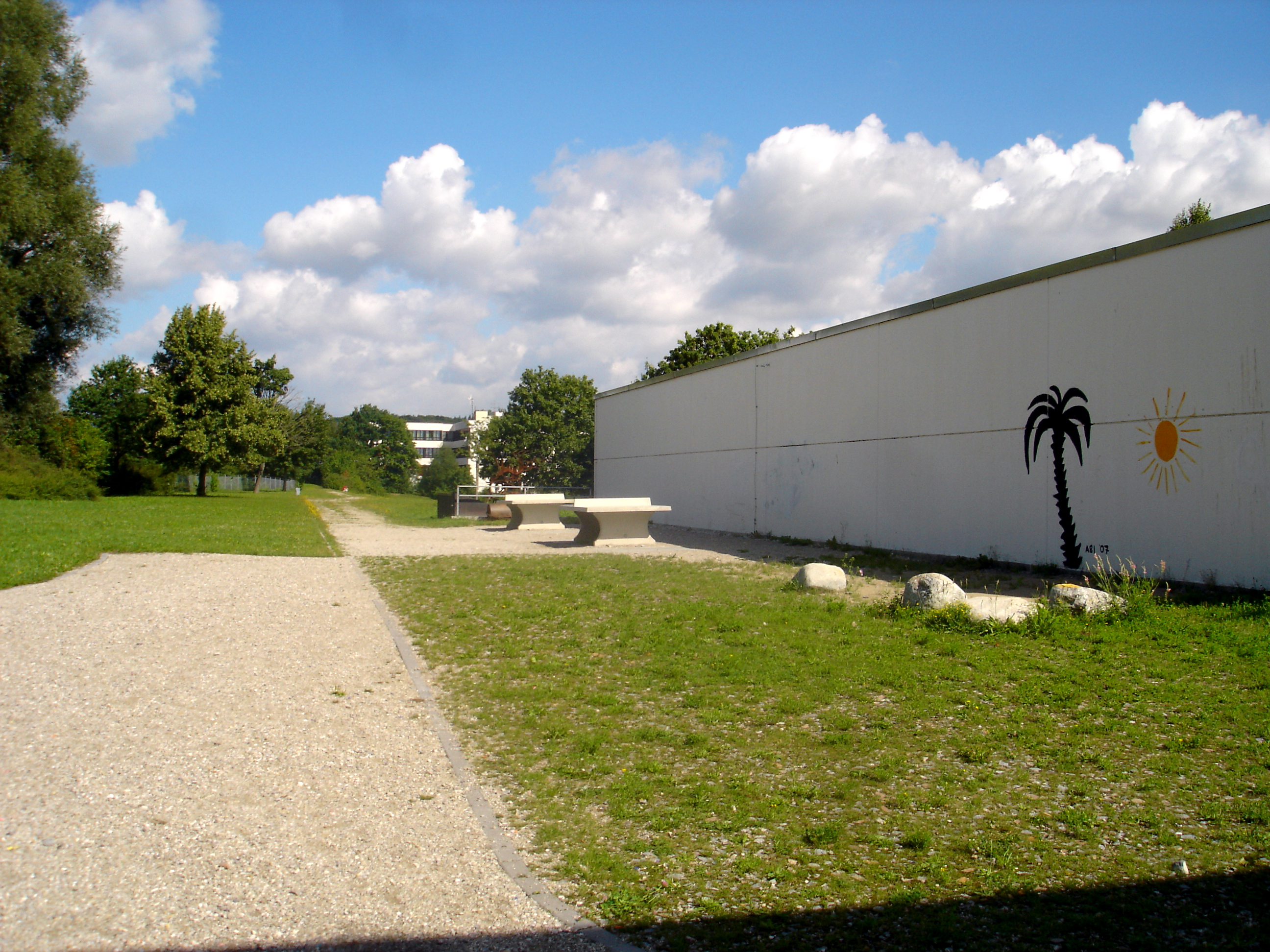 Rückwand der Turnhalle sowie Blick auf den Sportplatz des Camerloher-Gymnasiums Freising.